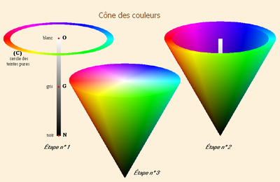 Représentation de l'espace tri-dimensionnel des couleurs sous forme de cône : l'axe vertical du cône correspond aux teintes grises (saturation S nulle, et luminance L variant depuis une valeur nulle en N et une valeur maximale en O) ; un point P quelconque situé à l'intérieur du cône correspond à une couleur dont les composantes T, S, L peuvent être définies ainsi : la teinte T varie linéairement avec la valeur de l'angle orienté du vecteur OH dans le plan du cercle (C), le point H étant la projection de P sur ce plan, la saturation S est proportionnelle à l'angle (NO,NP), la luminance L dépend de la valeur conventionnelle attribuée à la luminance des couleurs complètement saturées situées au bord du cercle (C) cf. mon article "Codage informatique des couleurs" [1]